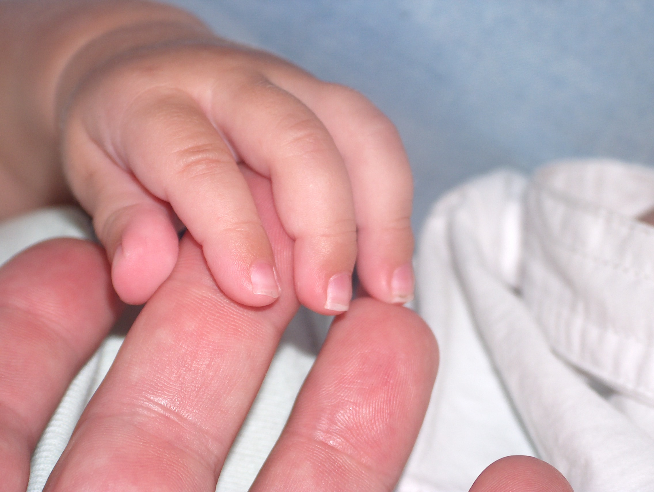 Mano de adulto toca mano de niño.